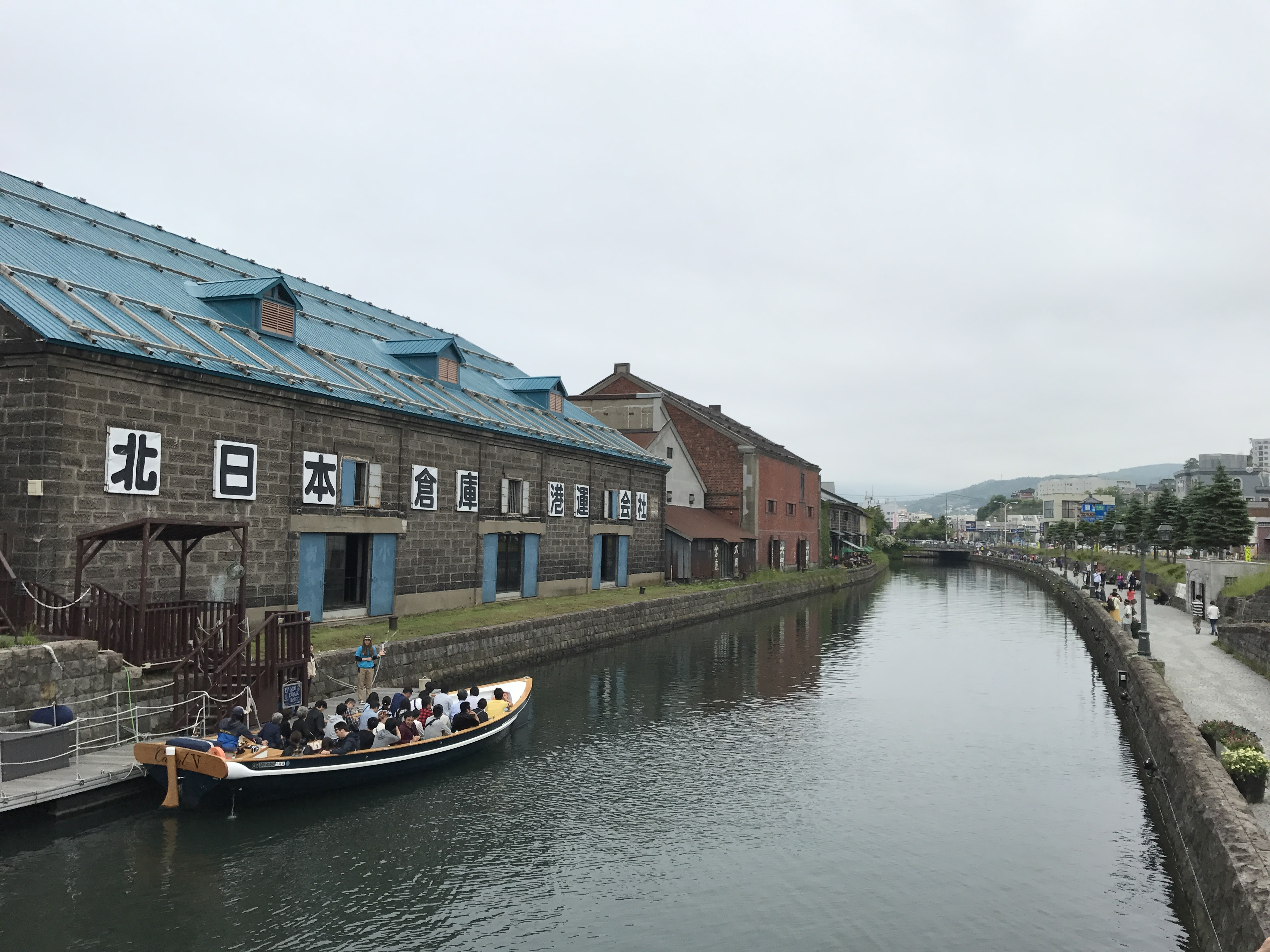 오타루 운하의 모습